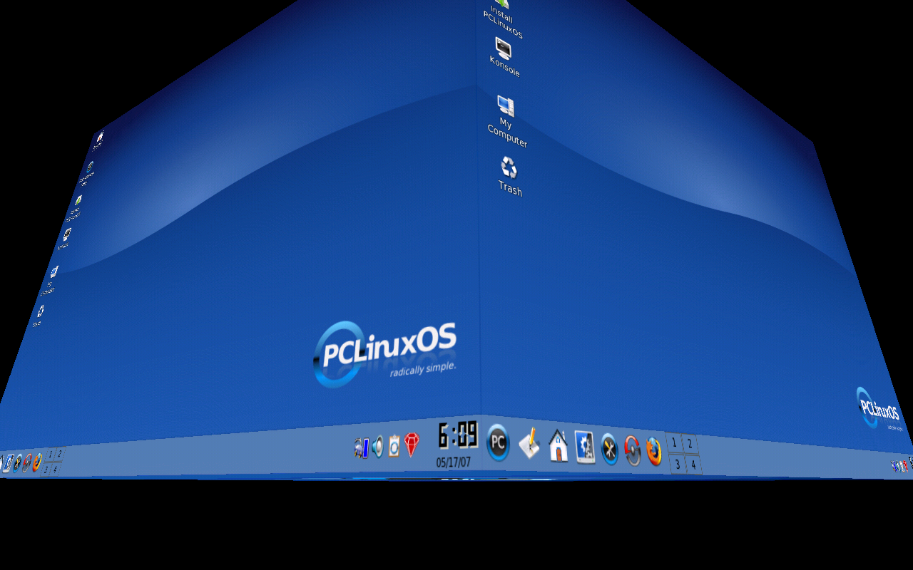 Captura de la distribución PCLinuxOS, mostrando el escritorio en "cubo".